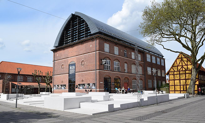 KØS Museum for kunst i det offentlige rum